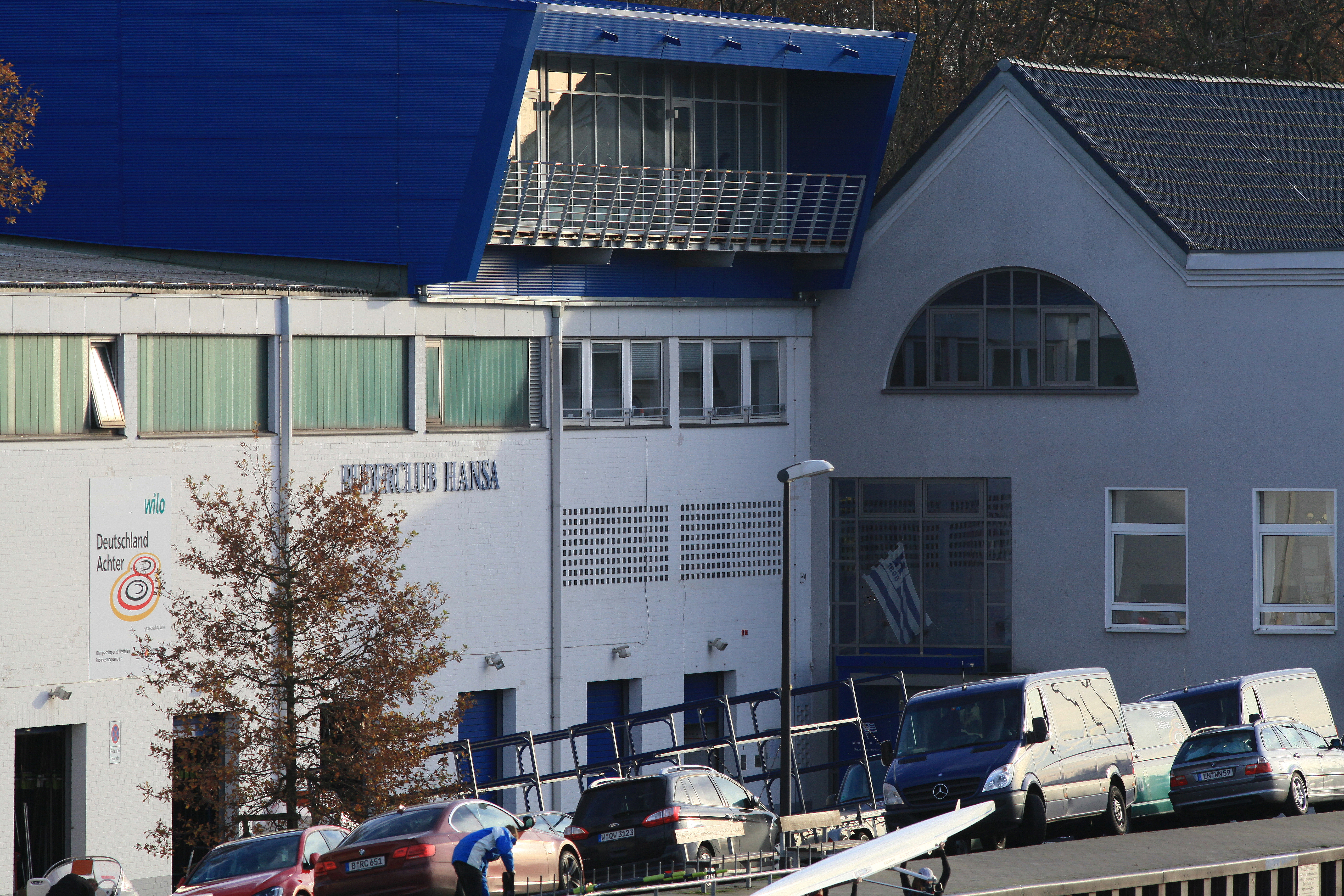 Blick von der Kanalbrücke Weidenstraße auf An den Bootshäusern in Dortmund